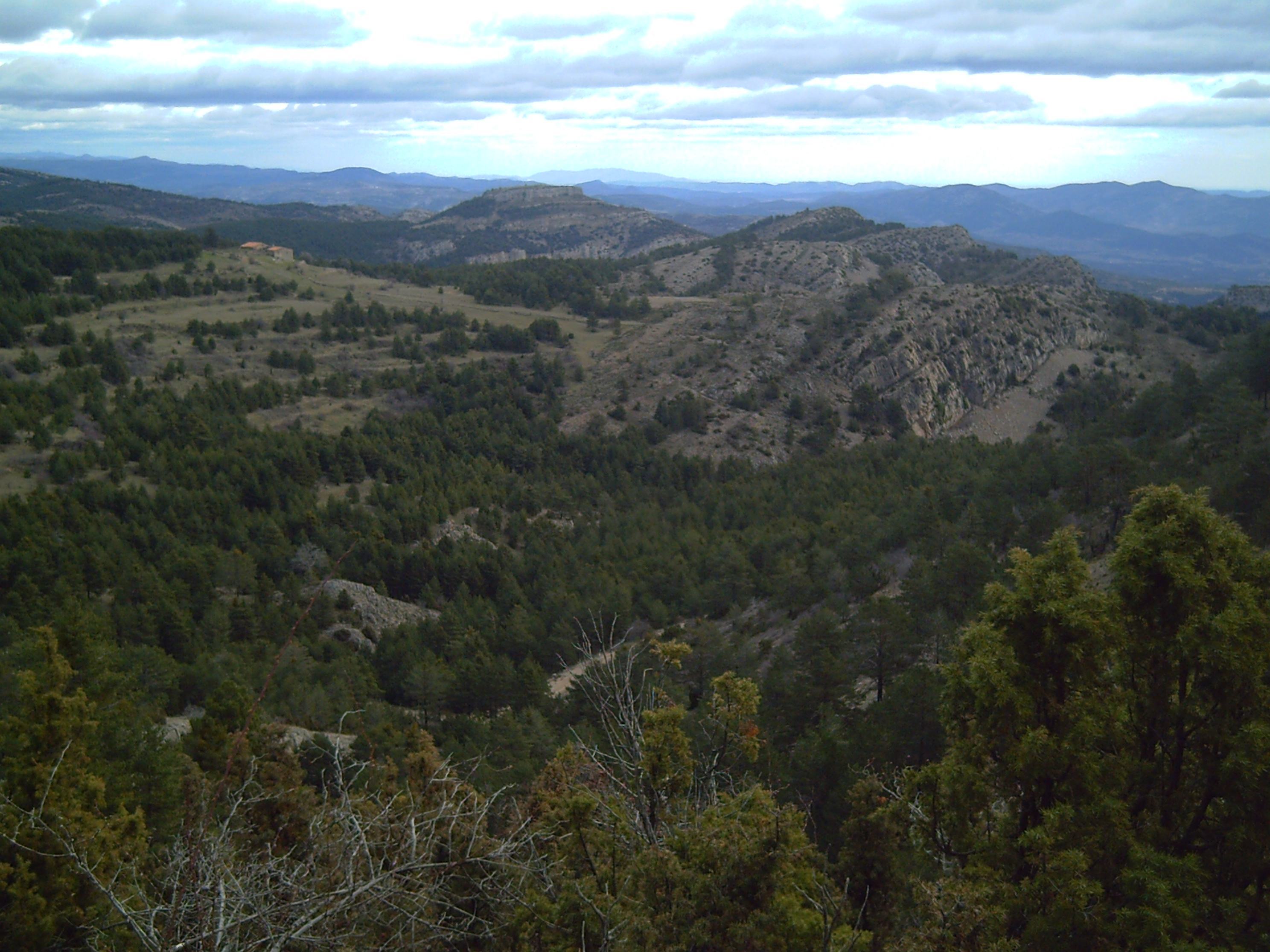 Fotografia presa per mi mateix el 25 de Febrer de 2007. En un moment d'ascens al Penyagolosa. La imatge es dirigeix cap al nord i s'observa el relleu tabular i subtabular de les serres del Maestrat.